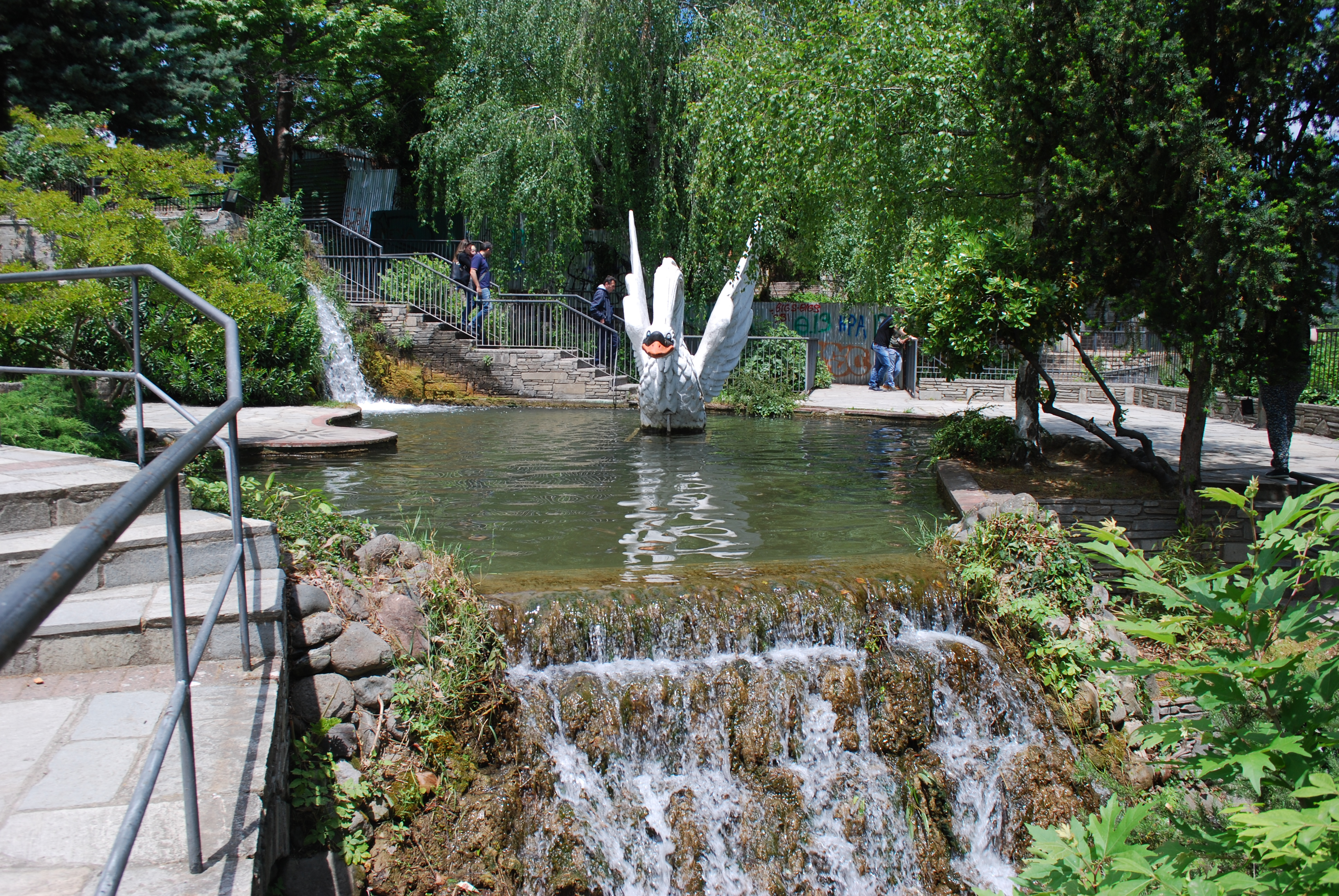 Vue des cataractes d'Edessa, en Macédoine (Grèce).